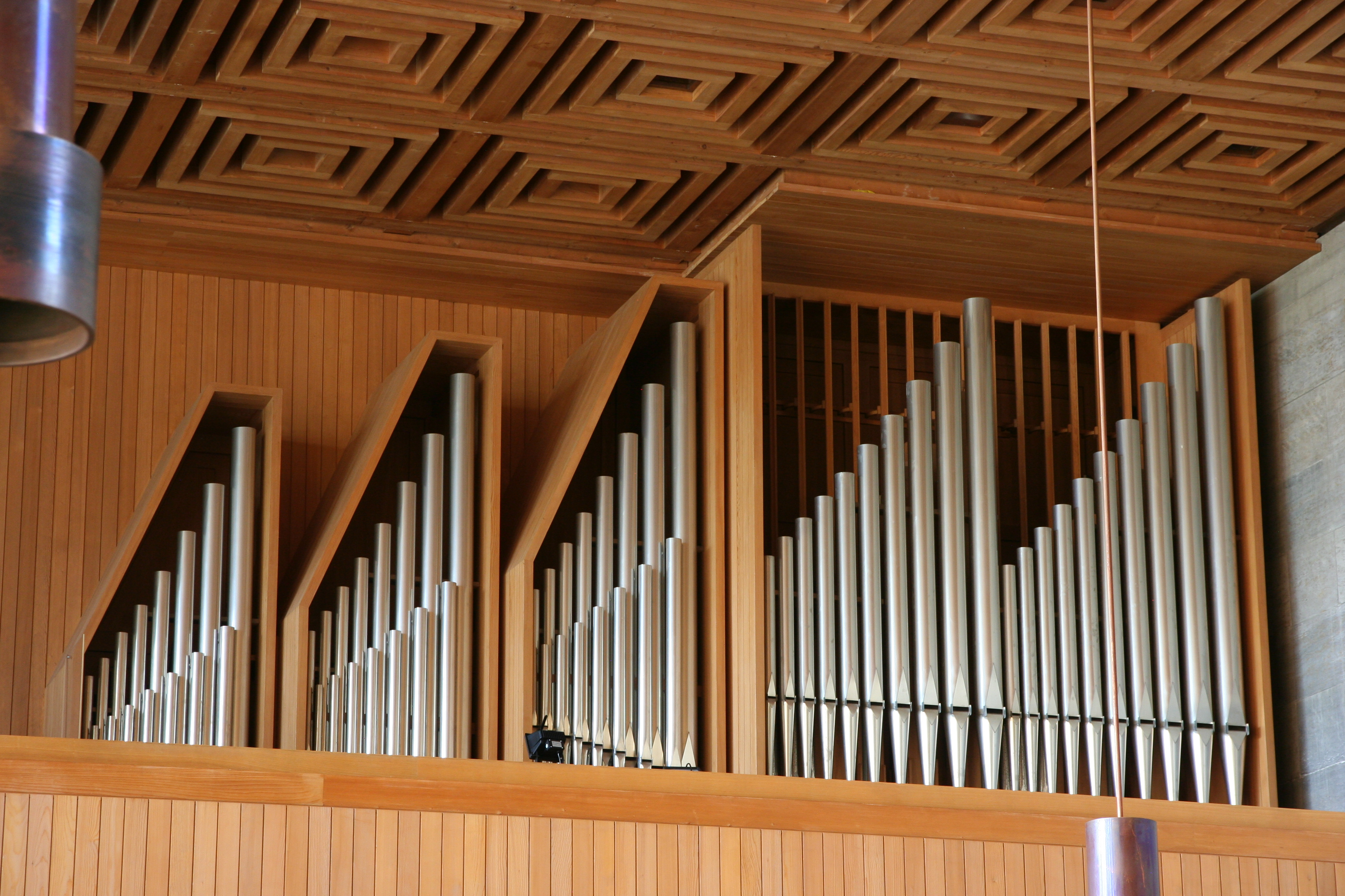 Krematorium Nordheim Zürich